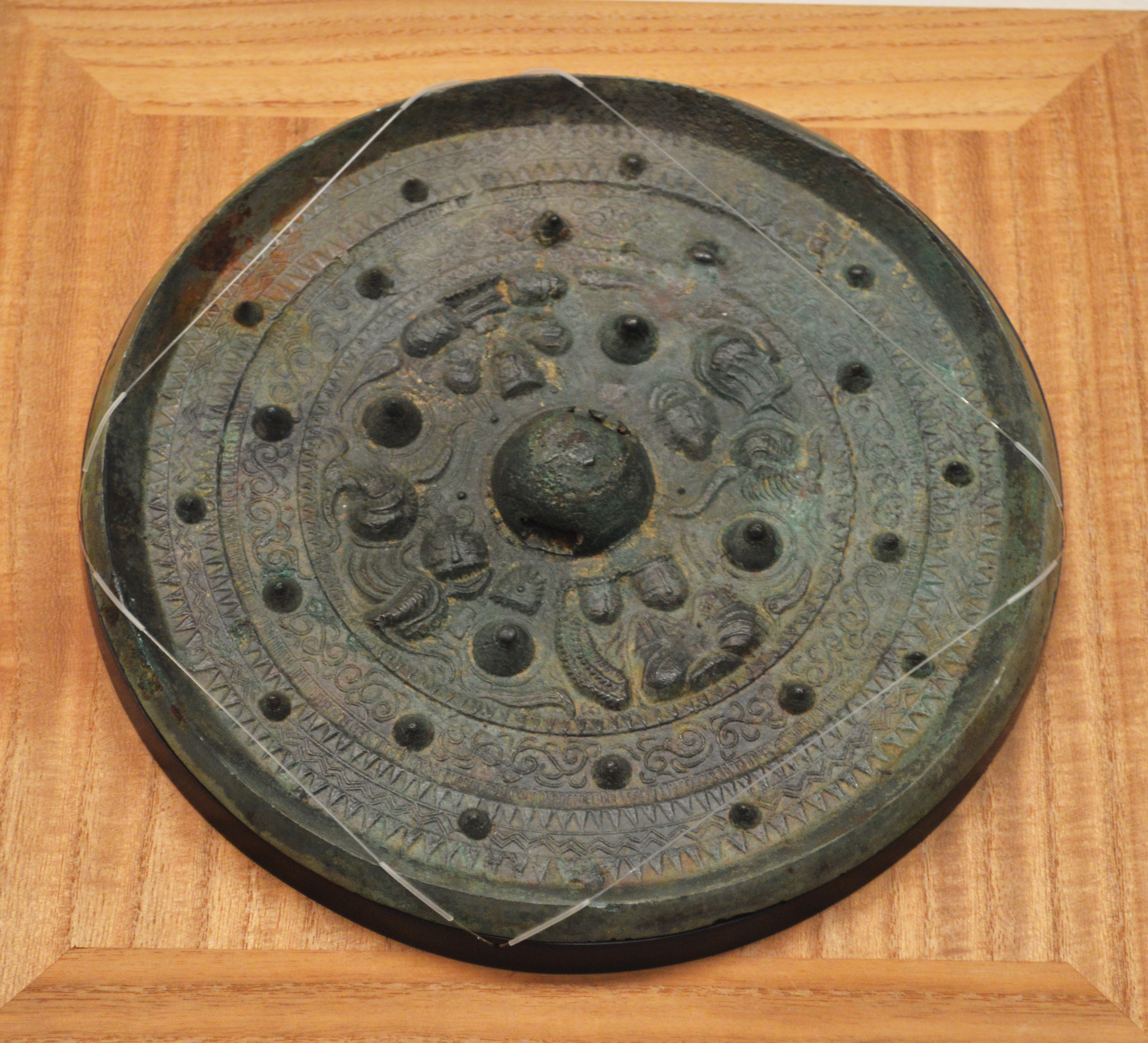 会津大塚山古墳南棺出土 三角縁唐草文帯三神二獣鏡